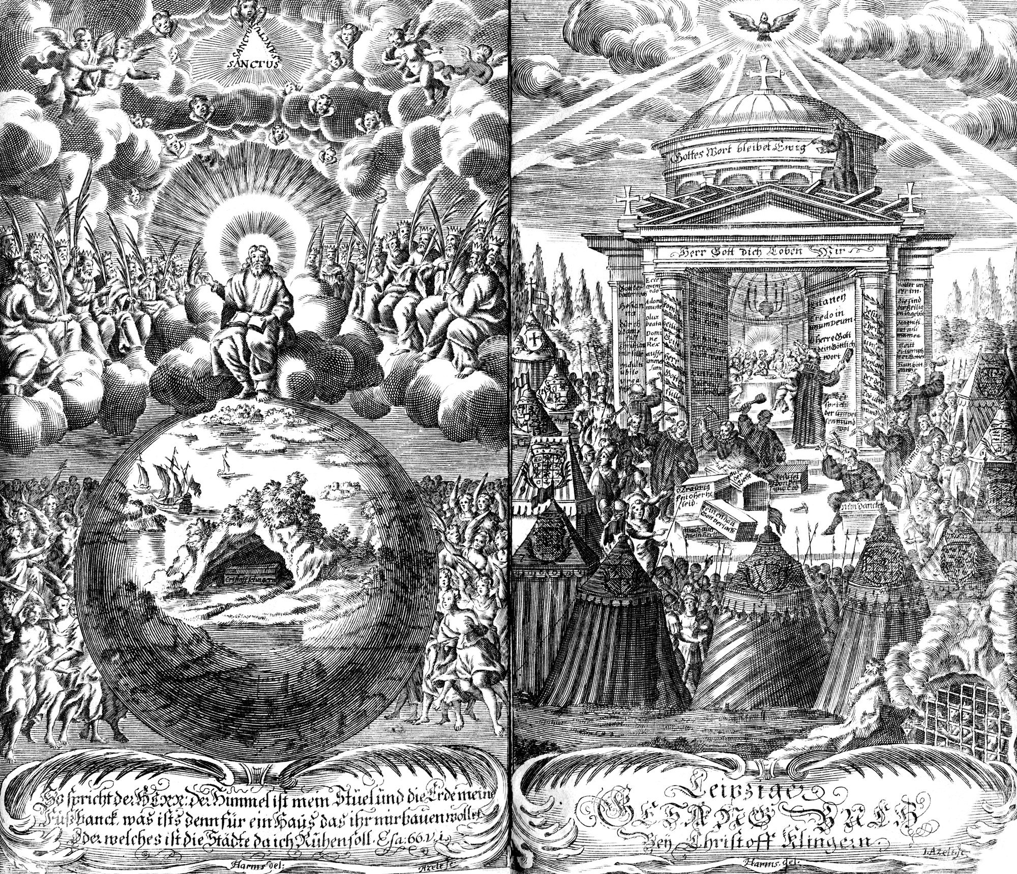 Titelkupfer des "Neu Leipziger Gesangbuch" von Gottfried Vopelius, verlegt von Christof Klingen